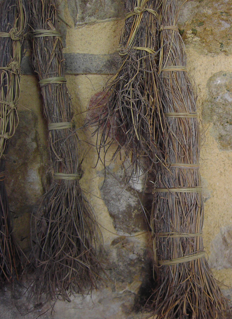 Aixames llestes per a ser cremades. Foto de Colla l'Aixama.